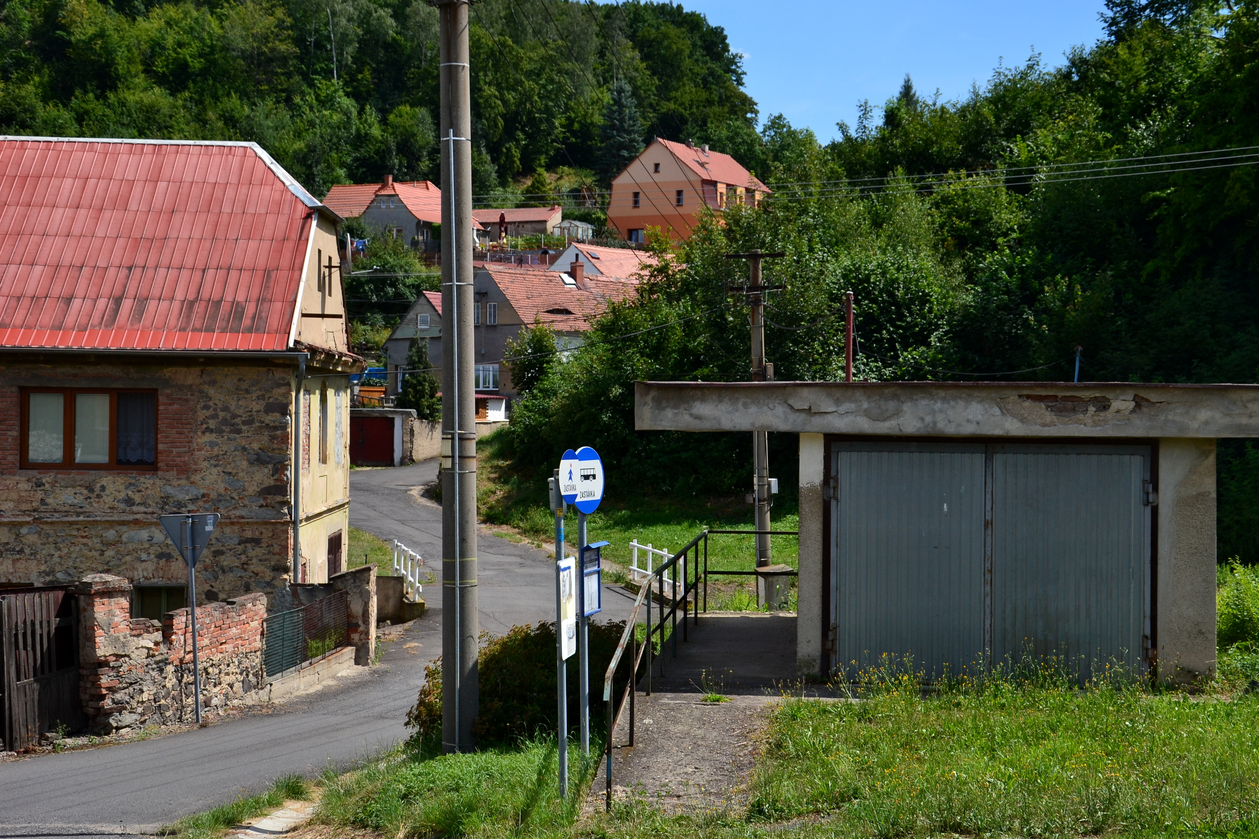 Východní část vesnice